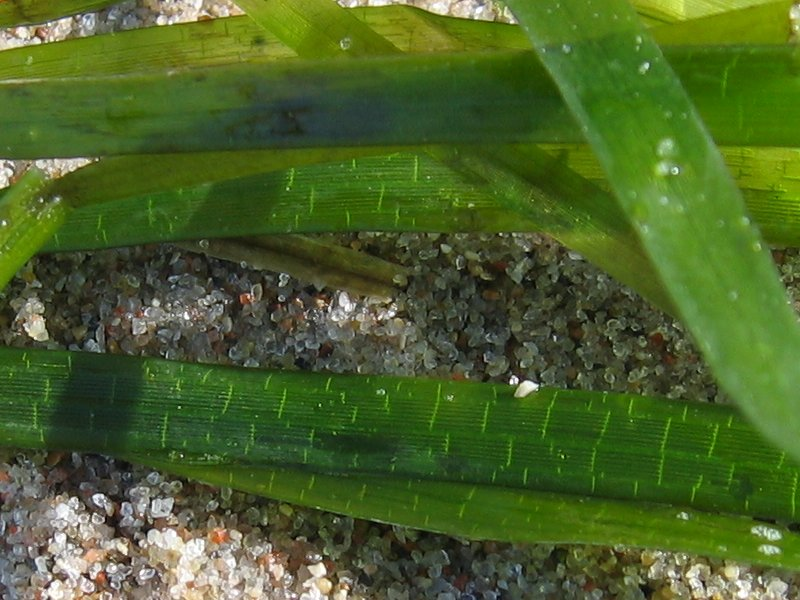 Gewöhnliches Seegras Zostera marina, Stoltera Nähe Rostock